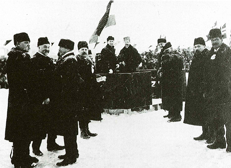 Den sportsinteresserte kong Haakon på ærestribunen under EM på skøyter på mjøsisen ved Hamar i 1911